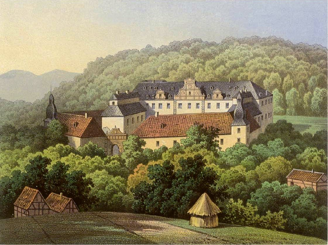 Schloss Ehreshoven, Kreis Wipperfürth, Rheinprovinz